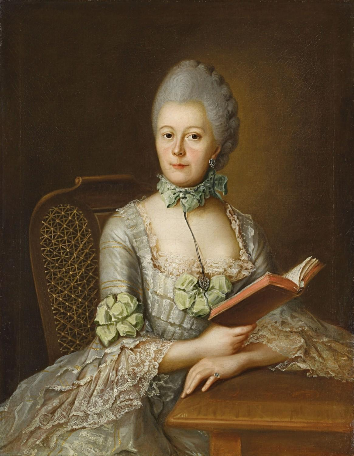 Anna Victoria von Rohan, Prinzessin von Soubise, geb. Prinzessin von Hessen-Rheinfels-Rotenburg (1728-1792)